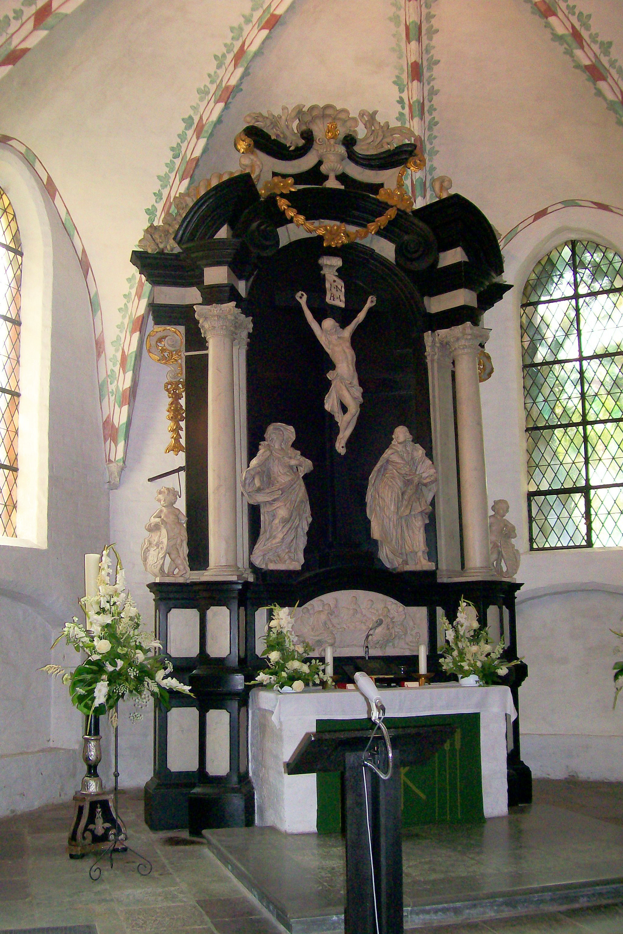 St. Georg church in Lübeck, Schleswig-Holstein, Germany, barocker Altar von Hieronymus Hassenberg/baroque high altar by Hieronymus Hassenberg